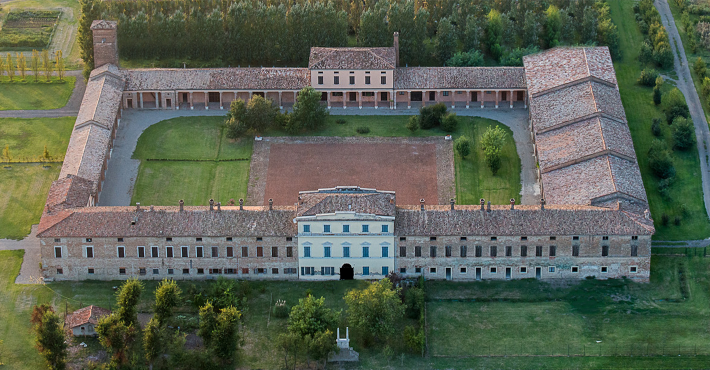 Vista aerea della Corte delle Piacentine